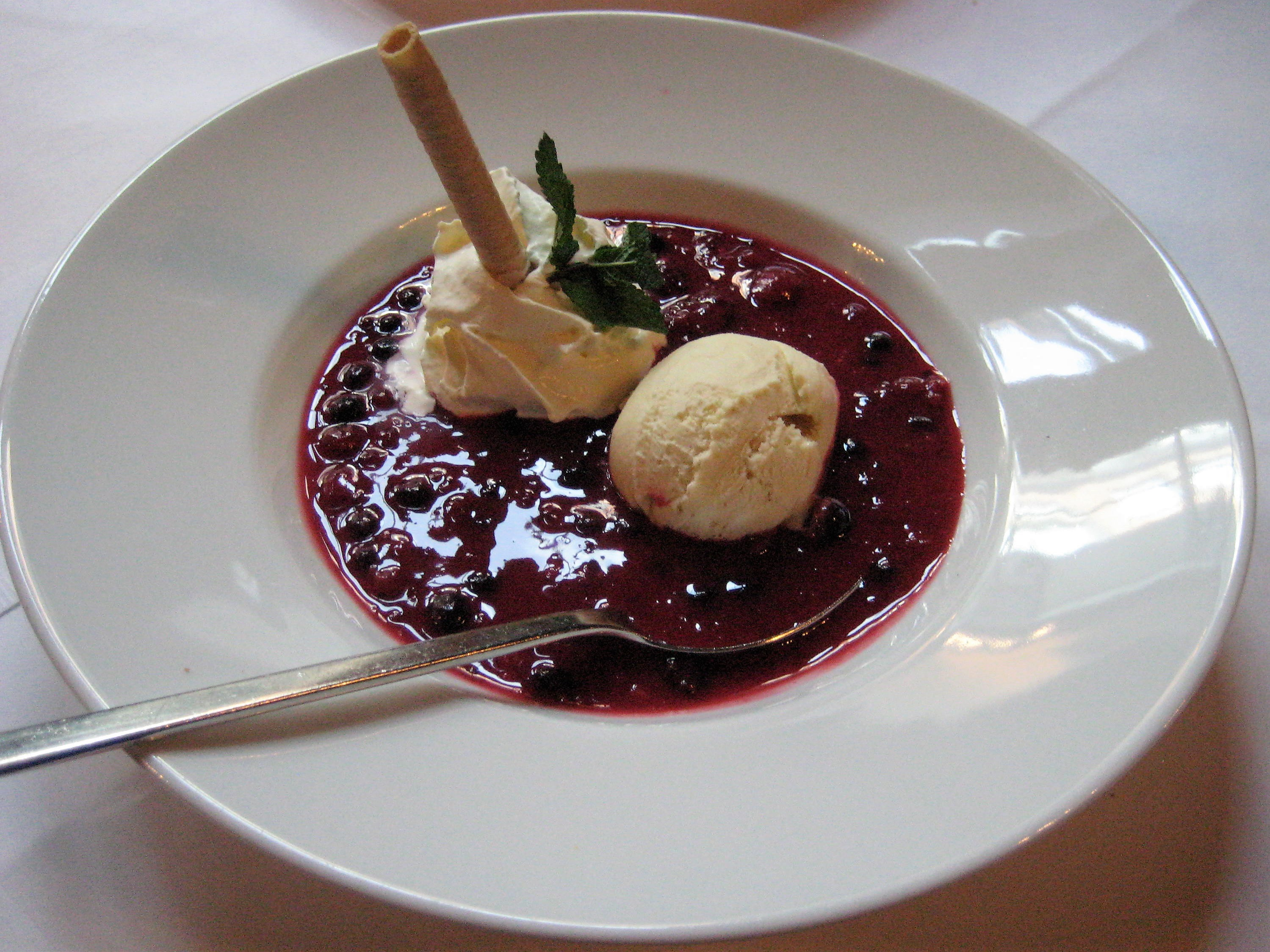 Bremer Rote Grütze, serviert mit Vanilleeiskugel und Schlagsahne.Hier im Restaurant „StadtWirt“ in Bremen-Altstadt.